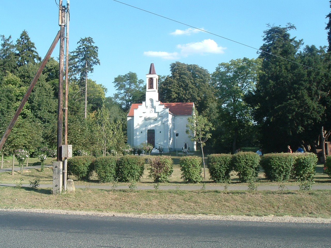 Tormásliget